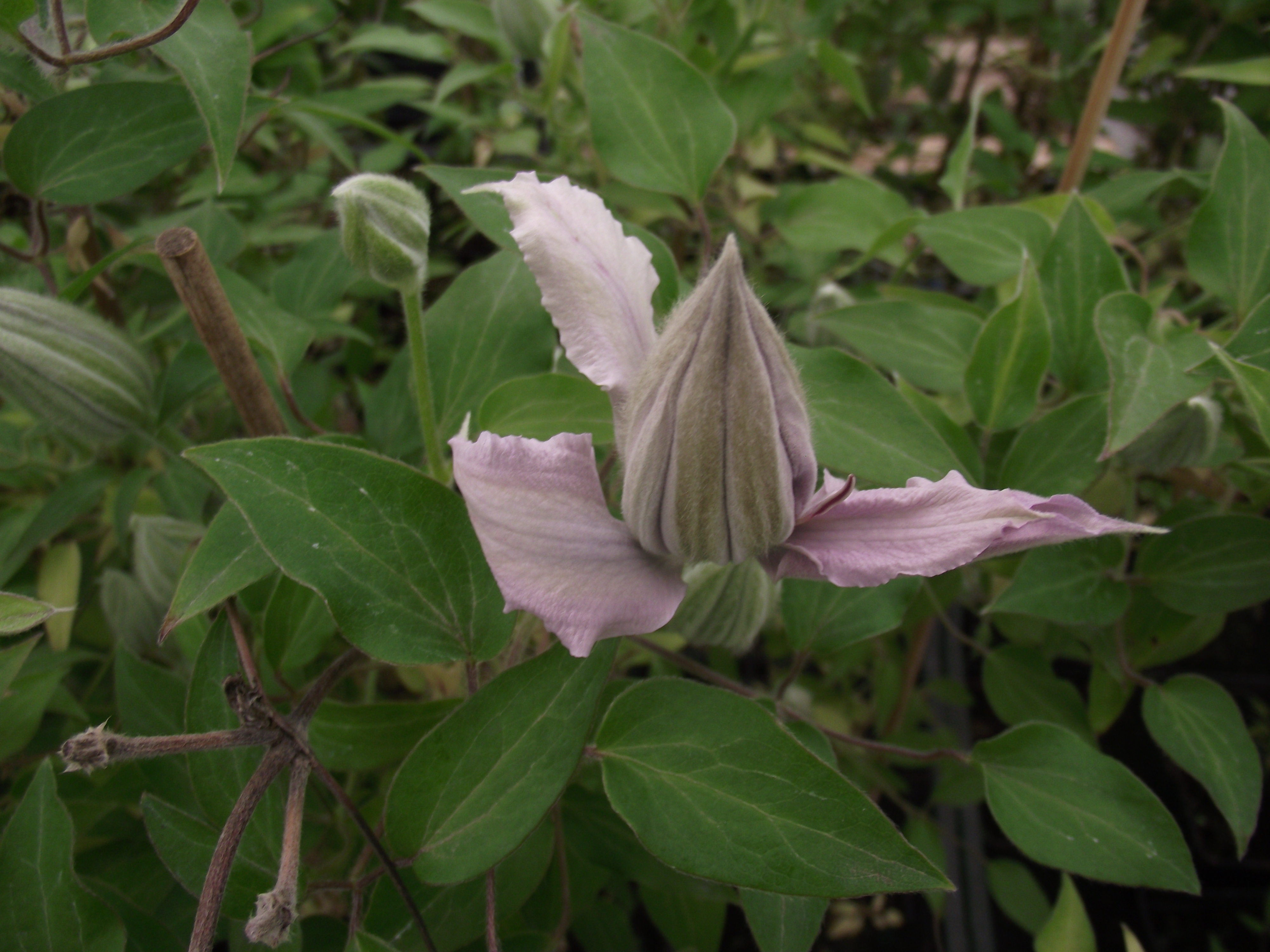 Clematis patens filigree evipo029 3